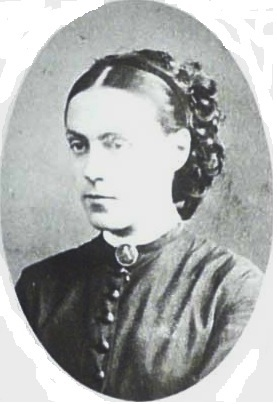 Poträt der Gräfin Juliane von Rehbinder aus dem Jahr 1847